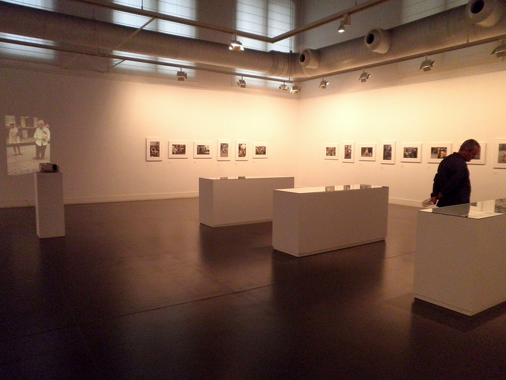 Exposición de Helen Levitt en la Sala Amos Salvador